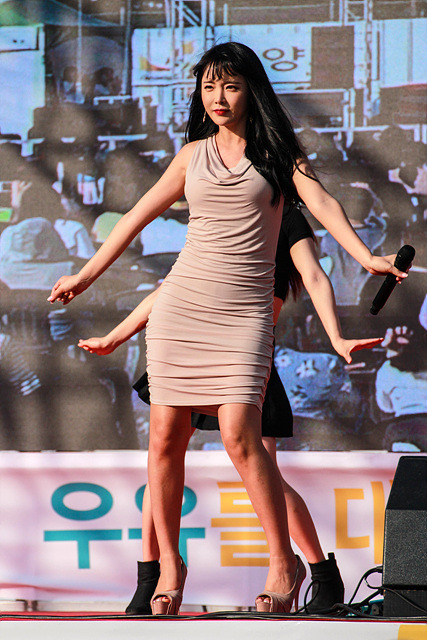 5월 26일 우유의 날 & 치즈에 퐁당 페스티벌 (홍보대사 홍진영)